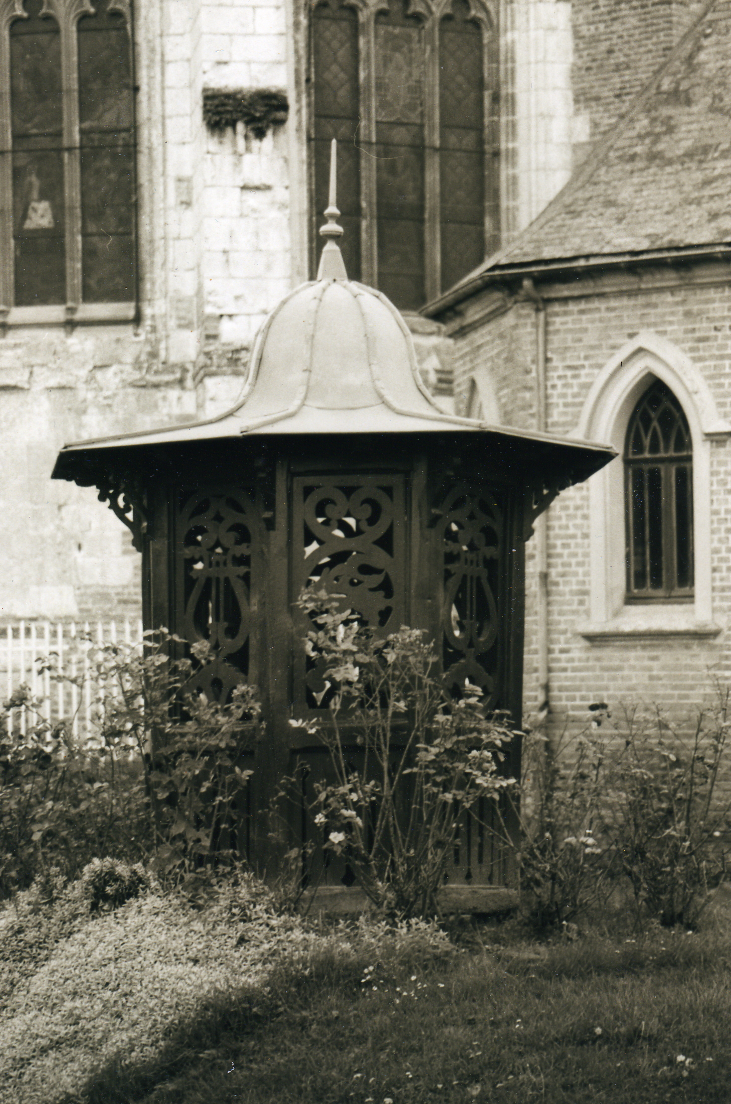 Ramburelles (Somme, France) Puits ancien avec l'église en arrière-plan.